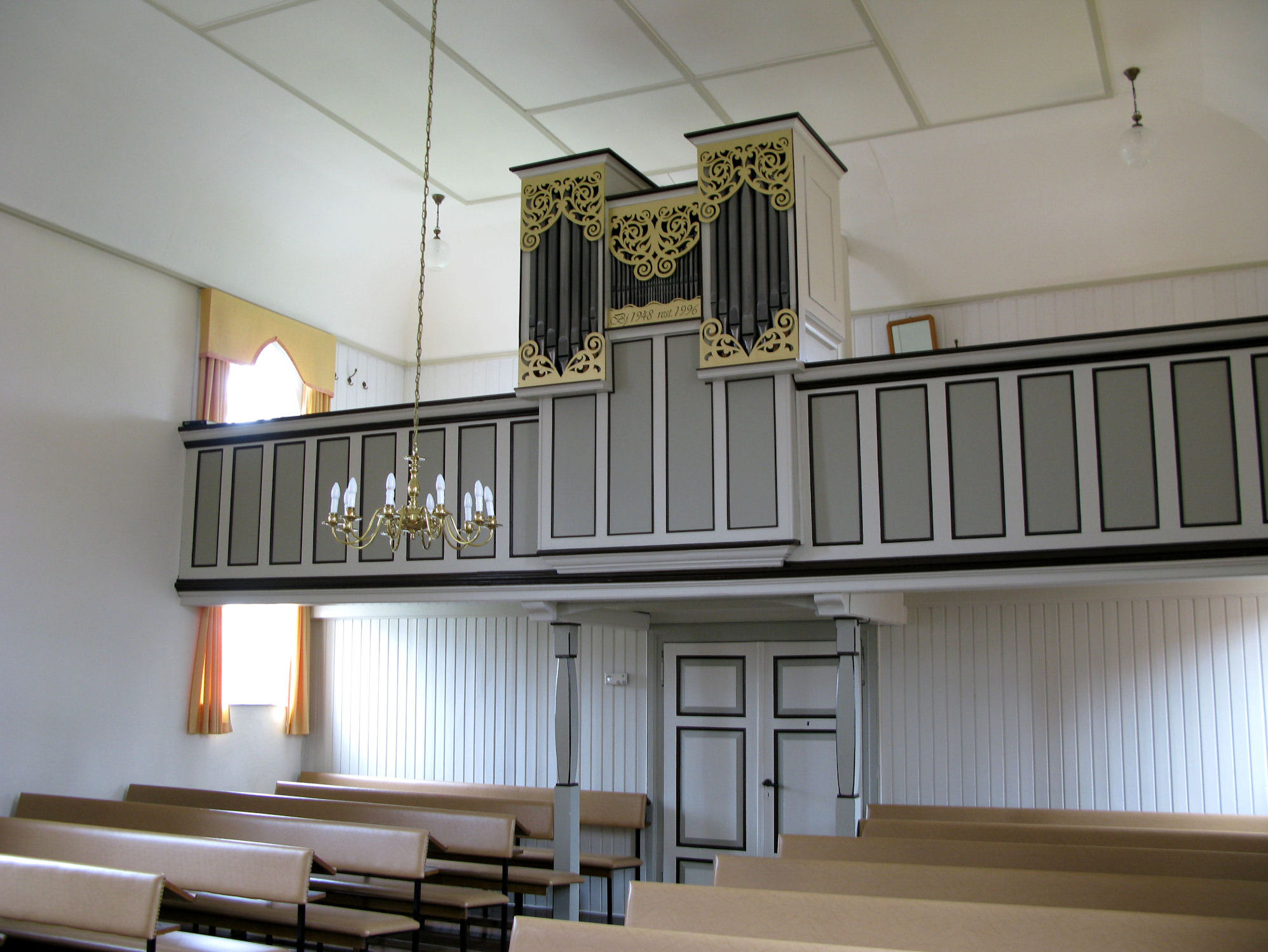 Orgel in Campen, altreformierte Kirche, Landkreis Aurich